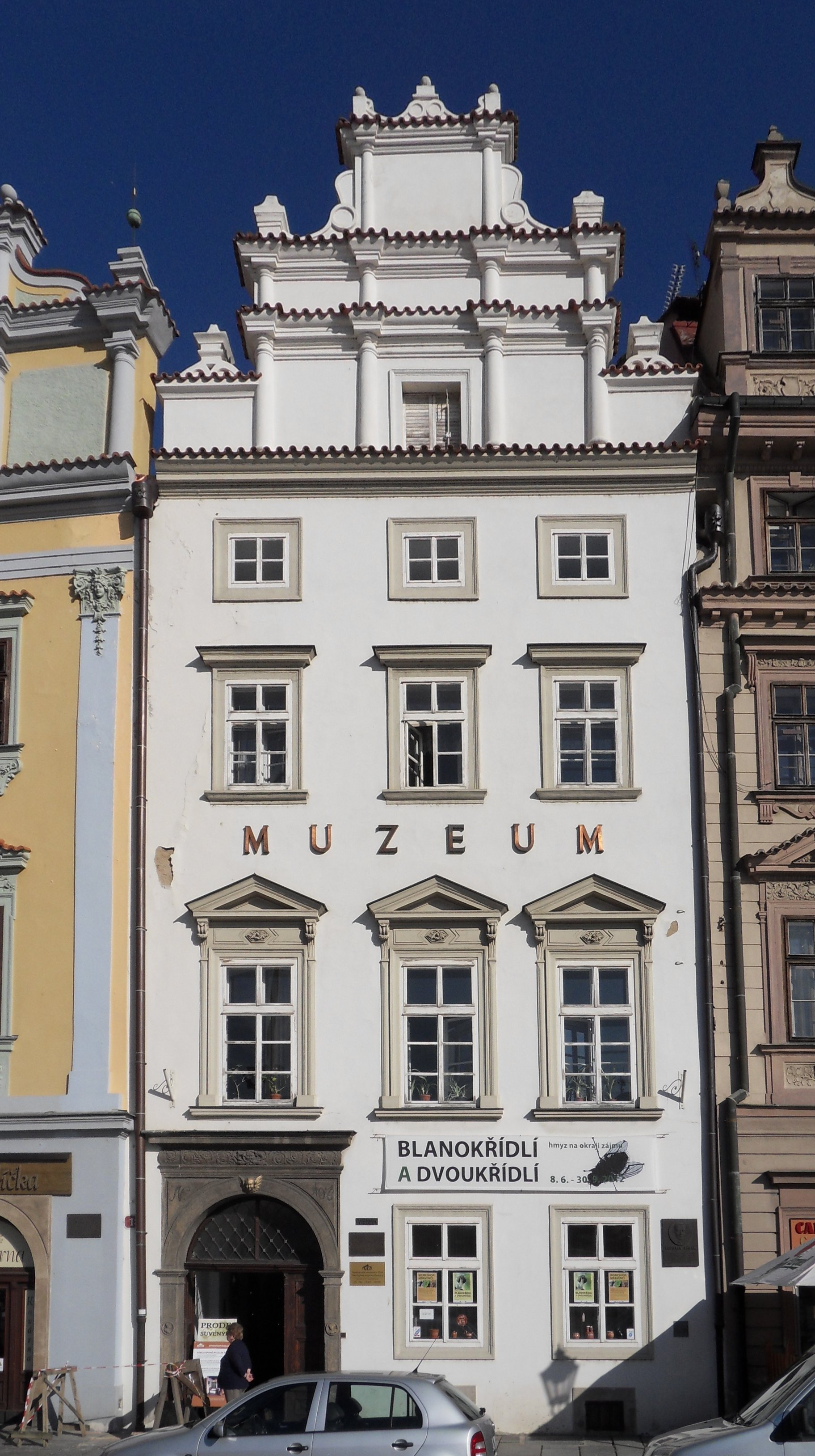 Chotěšovský dům, nám. Republiky 106/13, Plzeň